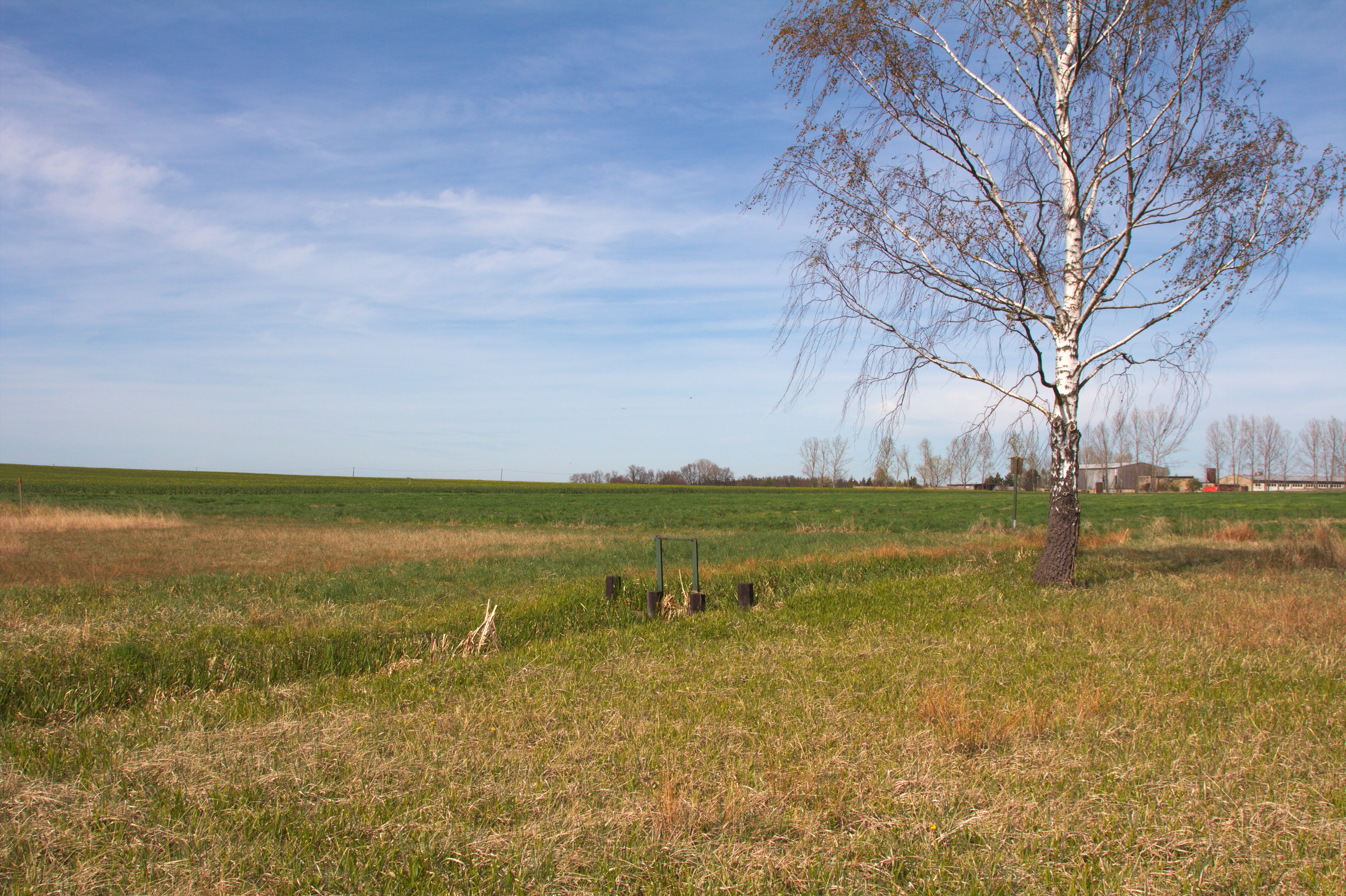 PP Děkanec